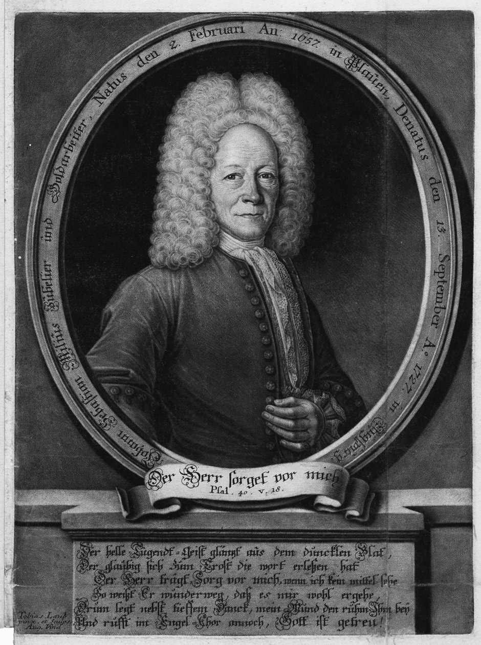 Portrait-Kupfertafel in Schabkunstmanier von Tobias Laub, aus: Samuel Urlsperger: Als der ... kunstberühmte Herr Johann Sebastian Mylius, gewester wohlangesehener Burger, Goldarbeiter und Jubelier allhier in Augspurg, den 13. Sept. anno 1727, ... selig verschieden, und darauf den 17. Sept. christlich zur Erden bestattet worden, in einer in der Haupt- und Pfarr-Kirchen zu St. Anna allhier aus dem von dem Herrn Mylius selbst erwählten Leichen-Text ... gehaltetenen Predigt, bey einer volckreichen Trauer-Versammlung vorgestellet. Augsburg, Samuel Fincke, (1727).